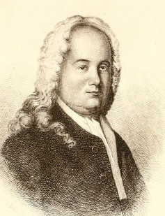 Samuel Carpenter's image